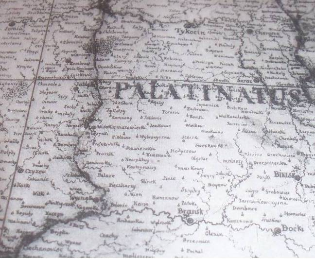 Siedzibą powiatu brańskiego było miasto Brańsk.